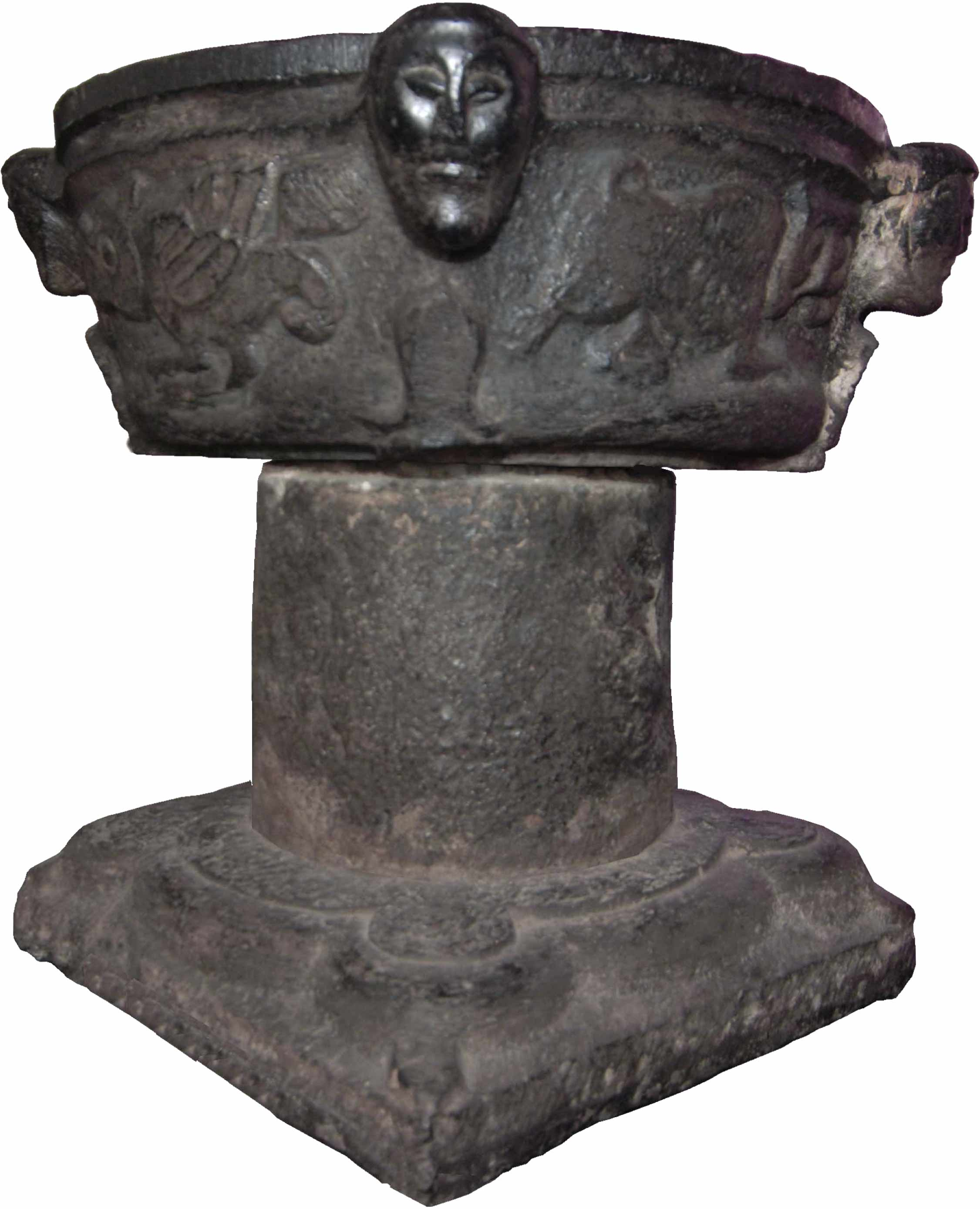 Mittelalterlicher Taufstein mit Reliefs und 4 Köpfen , St.Adelgundis Arsbeck